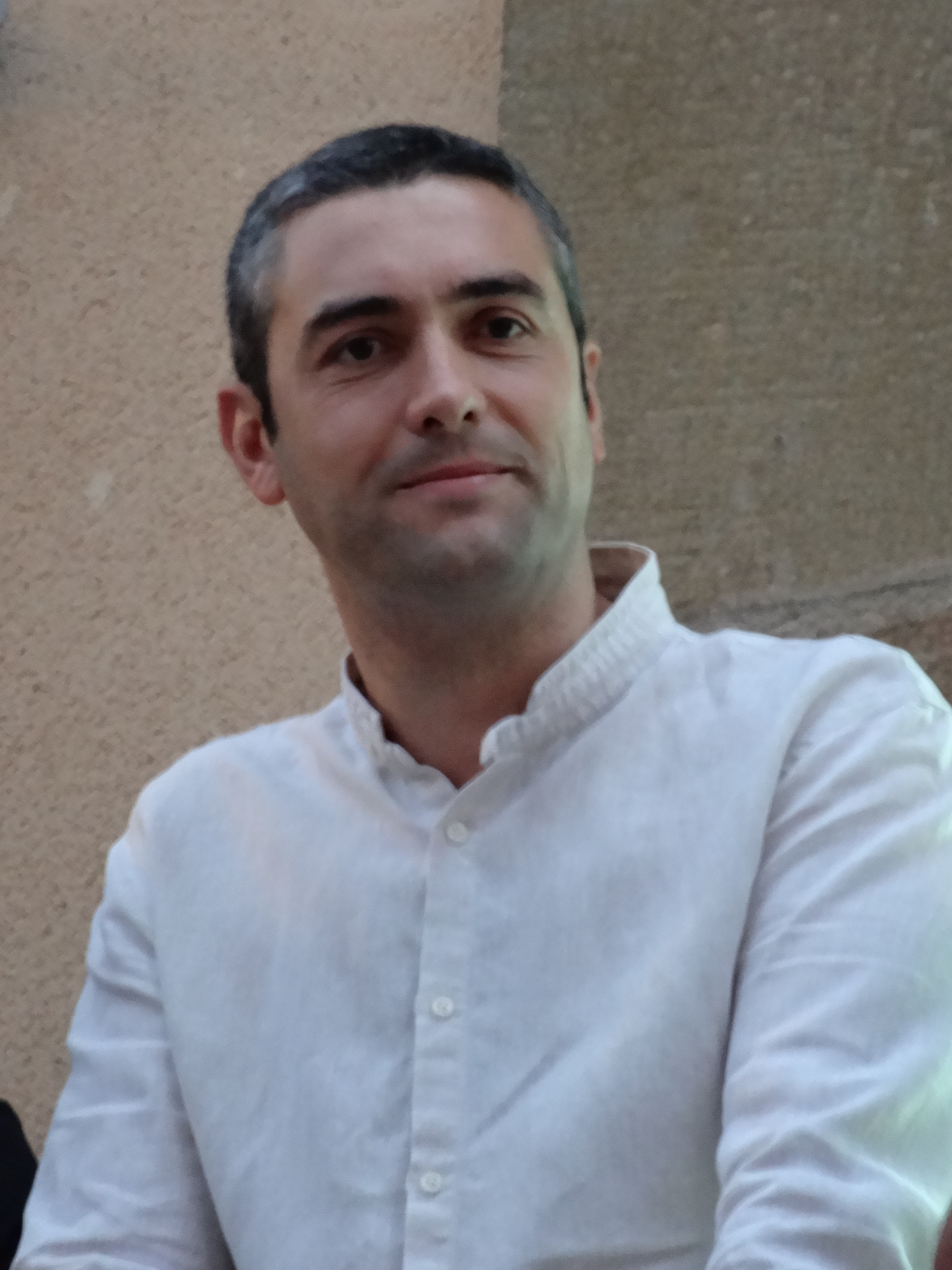 Bernat Solé - alcalde d'Agramunt